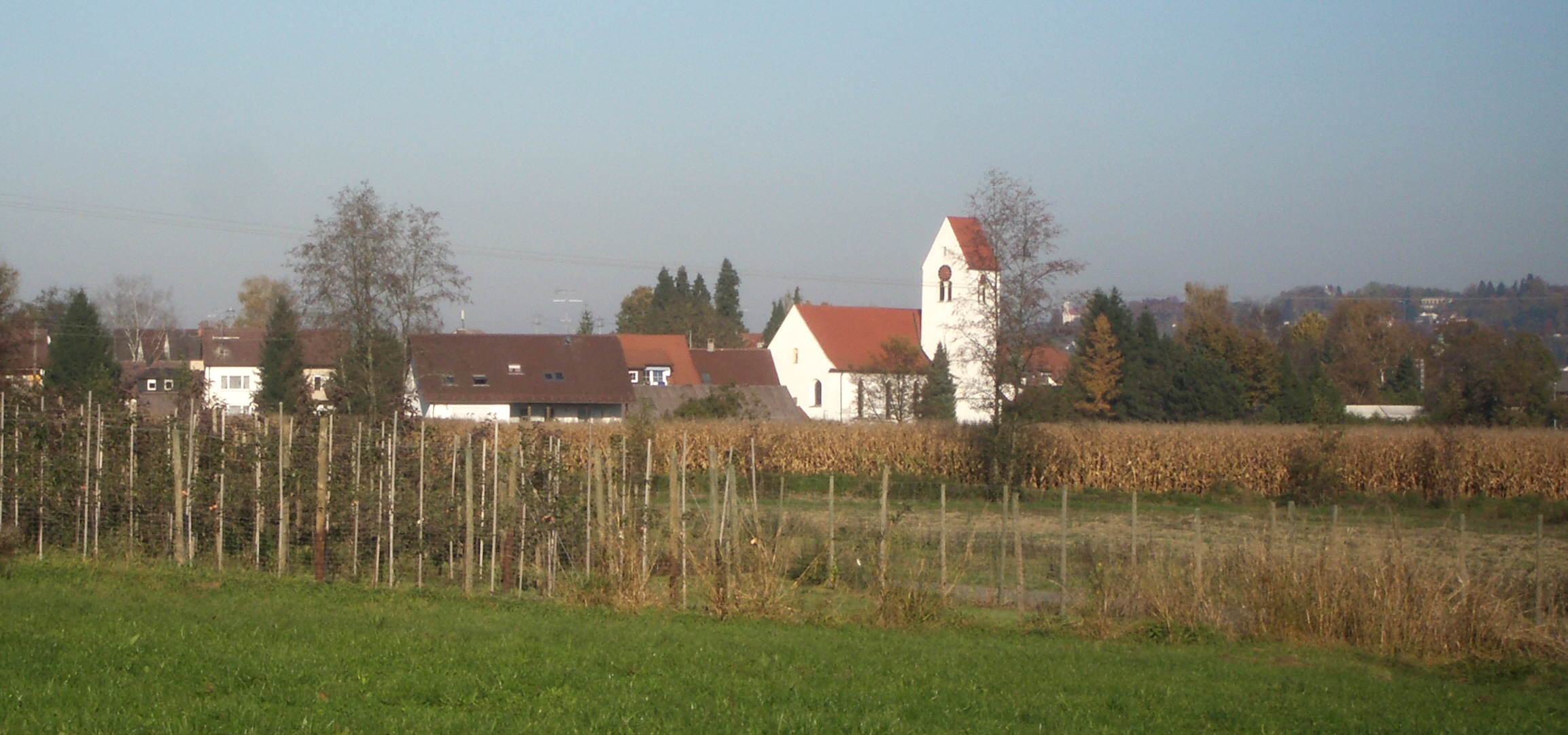 Ravensburg, Ortschaft Taldorf: Blick auf Oberzell (von Süden) mit der Kirche zur Schmerzhaften Muttergottes